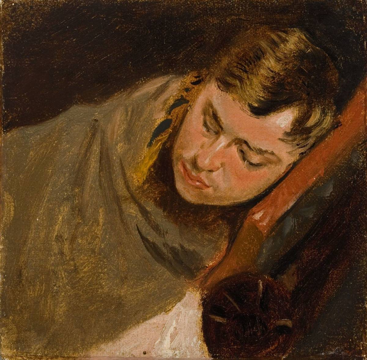 Т. Гарэцкі. Партрэт брата Людвіка